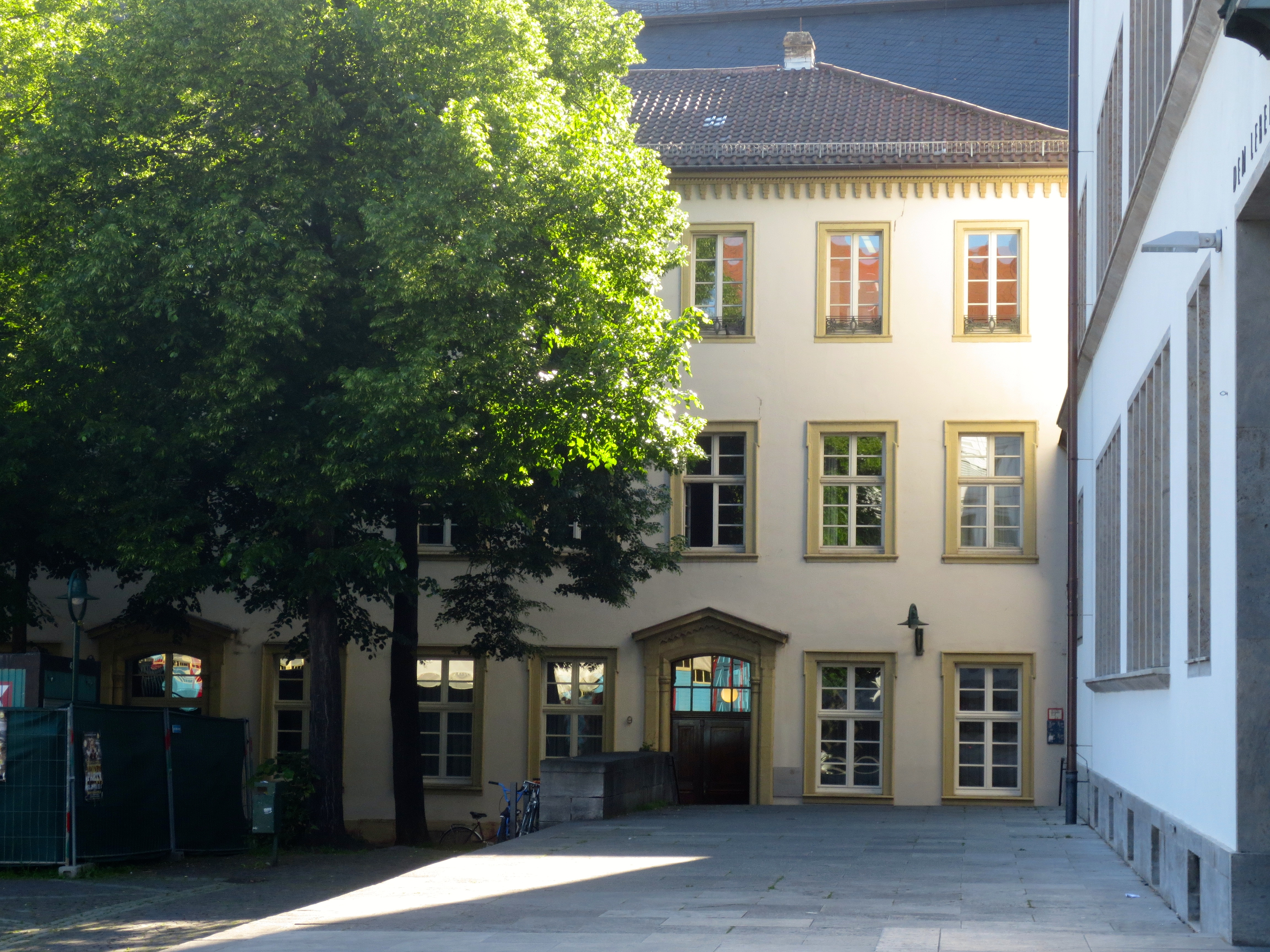 Campus Altstadt, Östliche Platzwand Universitätsplatz (Heidelberg) zwischen Merianstraße und Marsiliusplatz, Augustinergasse 9, Institut für ausländisches und internationales Privat- und Wirtschaftsrecht der Ruperto Carola